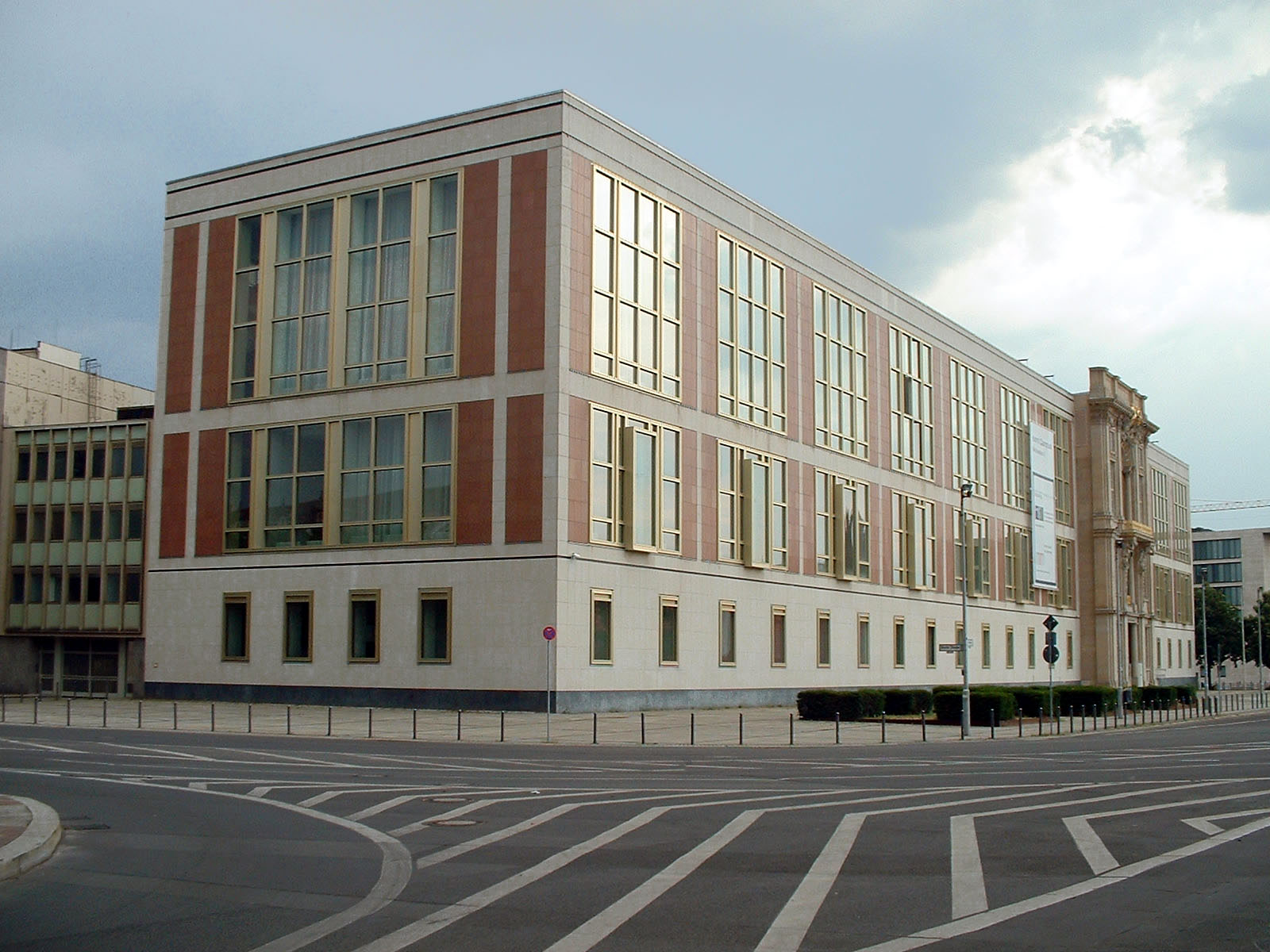 Ehemaliges Staatsratsgebäude der DDR am Schlossplatz in Berlin-Mitte.